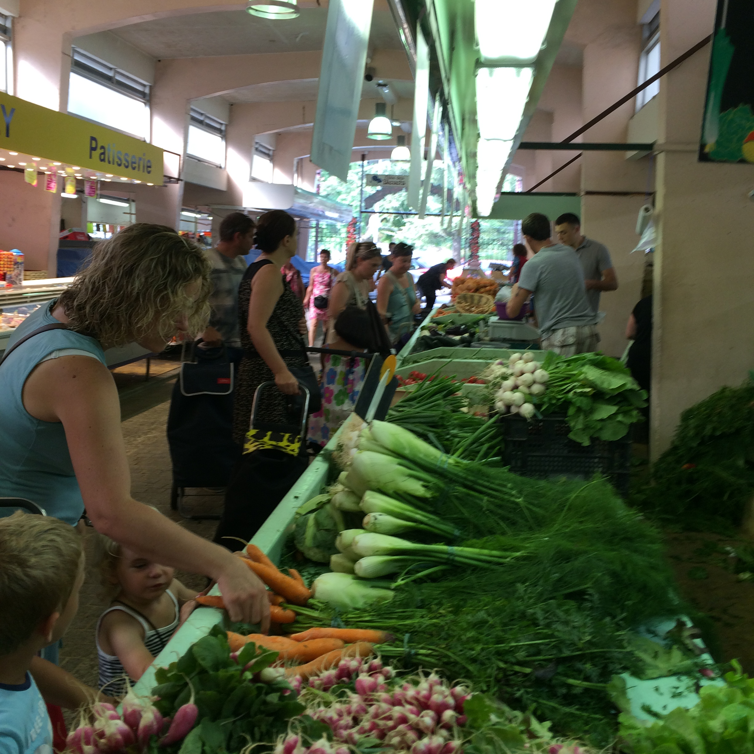 Intérieur du marché couvert de Houilles